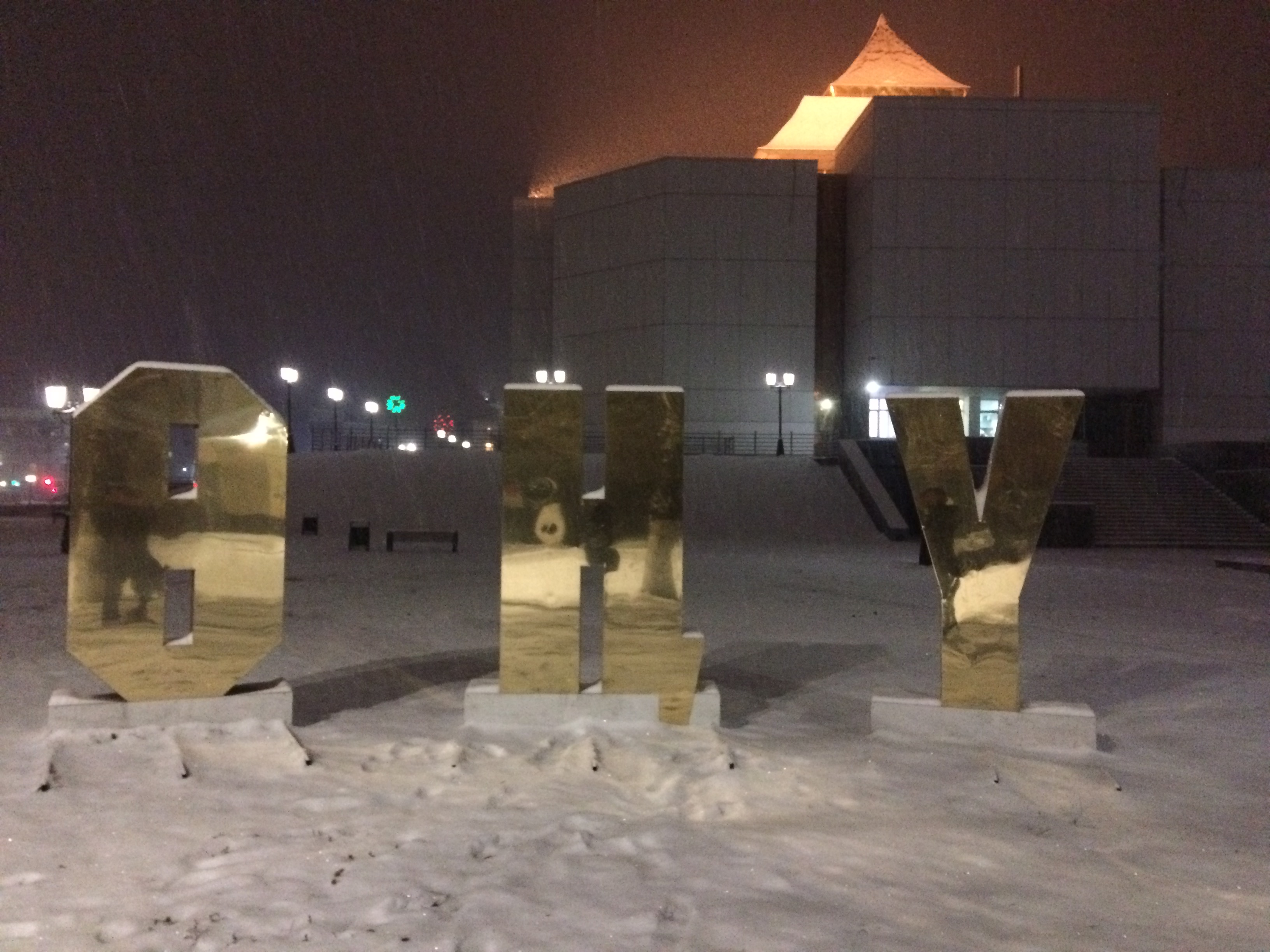 Современный символ тувинского языка. Учитываются особые буквы (звуки) ӨҢҮ. Конечно, есть еще символ фарингализации Ъ, его тут нет.